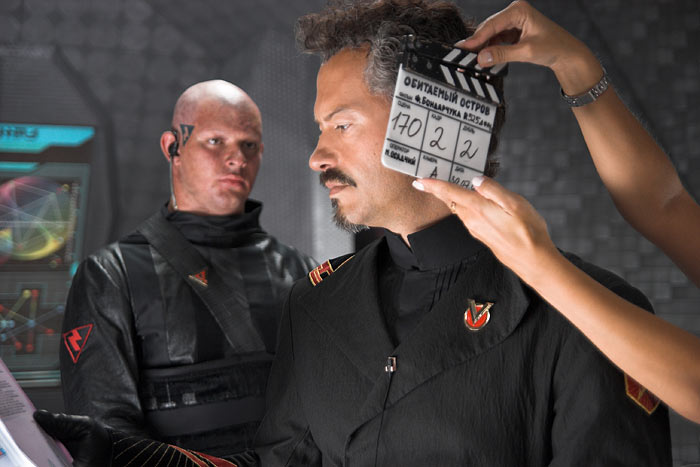 Фёдор Бондарчук на съёмках дилогии "Обитаемый остров"